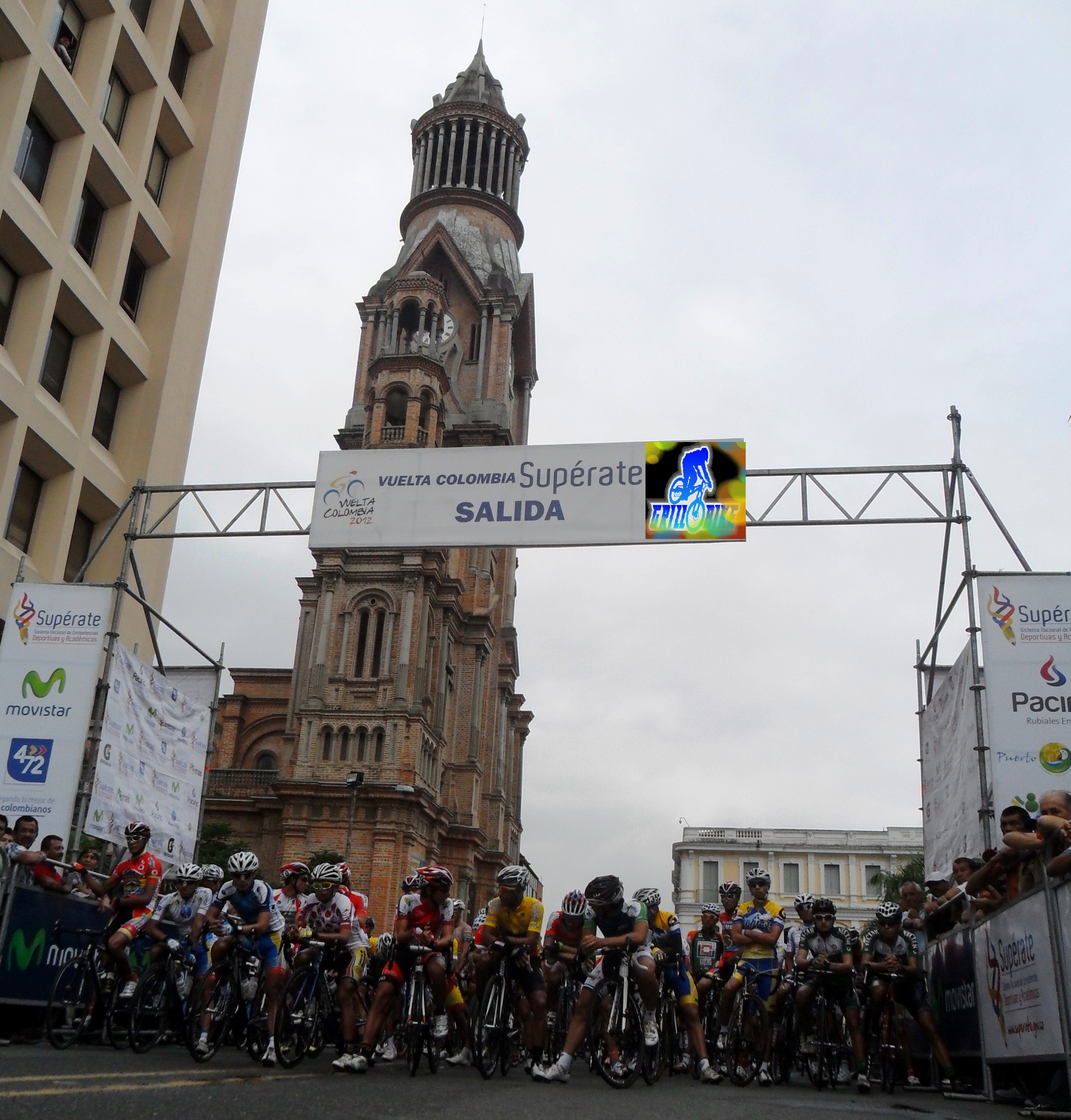 Vuelta a Colombia 2012, Partida Etapa 8 (Palmira-Dosquebradas)